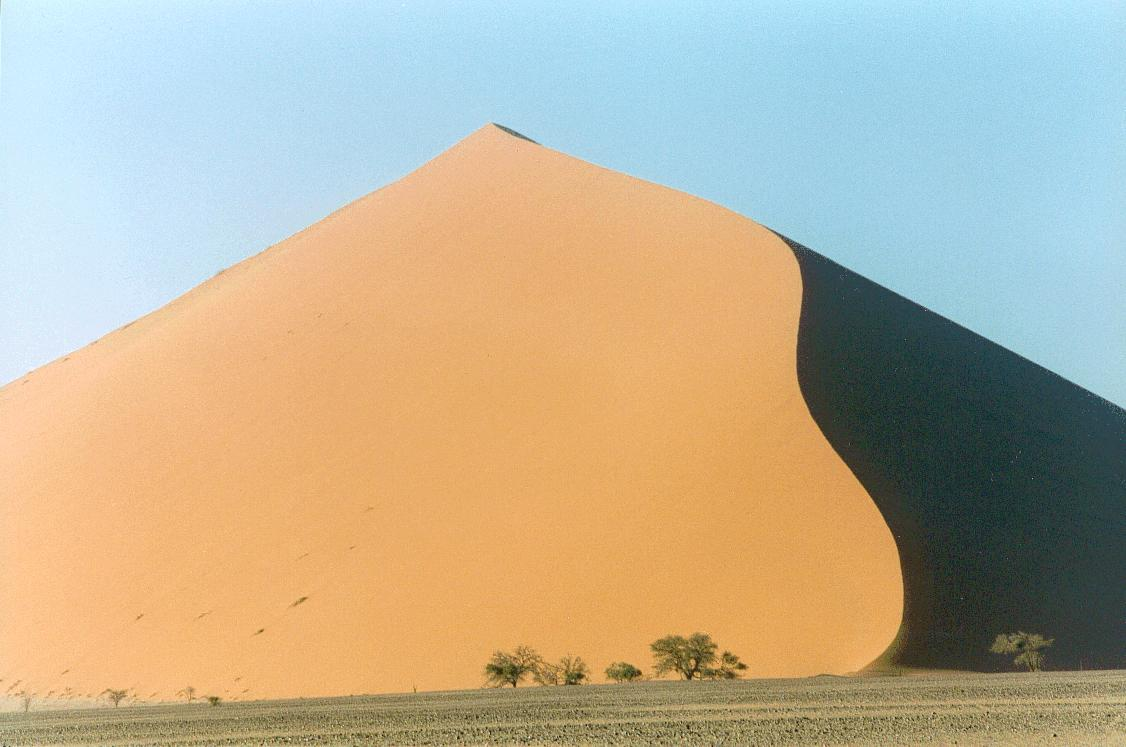 Dune du désert de Namib, Namibie.